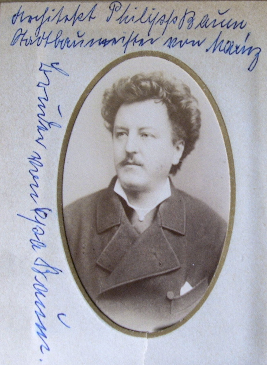 Fotoaufnahme von Philipp Baum